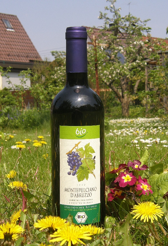 "Montepulciano d Abruzzo" vom Aldi-Süd als Bio Wein